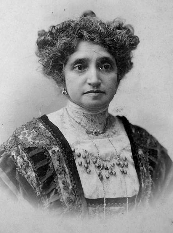 Fotografia de D. Guilhermina Pena, esposa do presidente Afonso Pena.